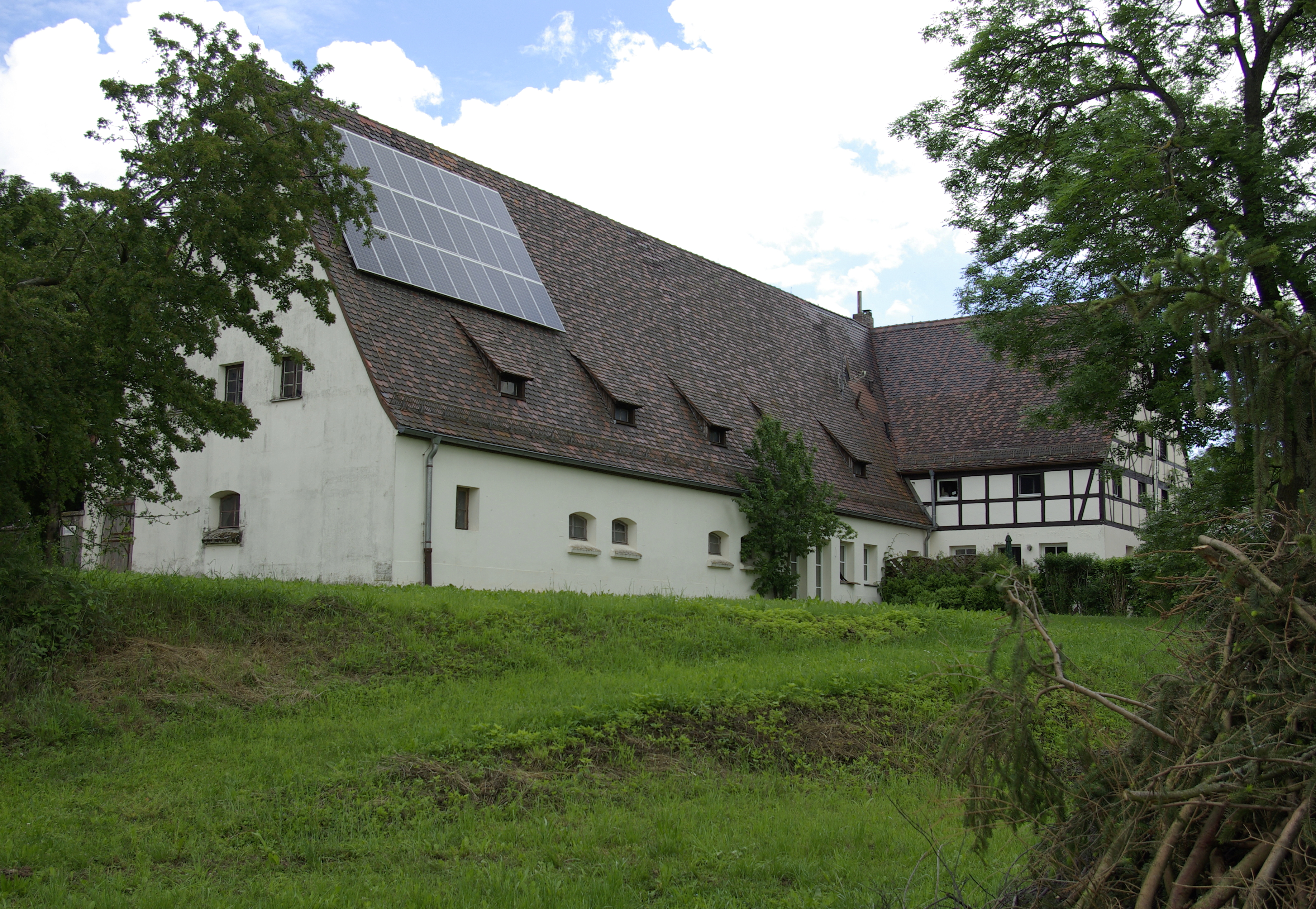 Pleikershof. Original erhaltene westliche Hälfte des Rinderstalls.